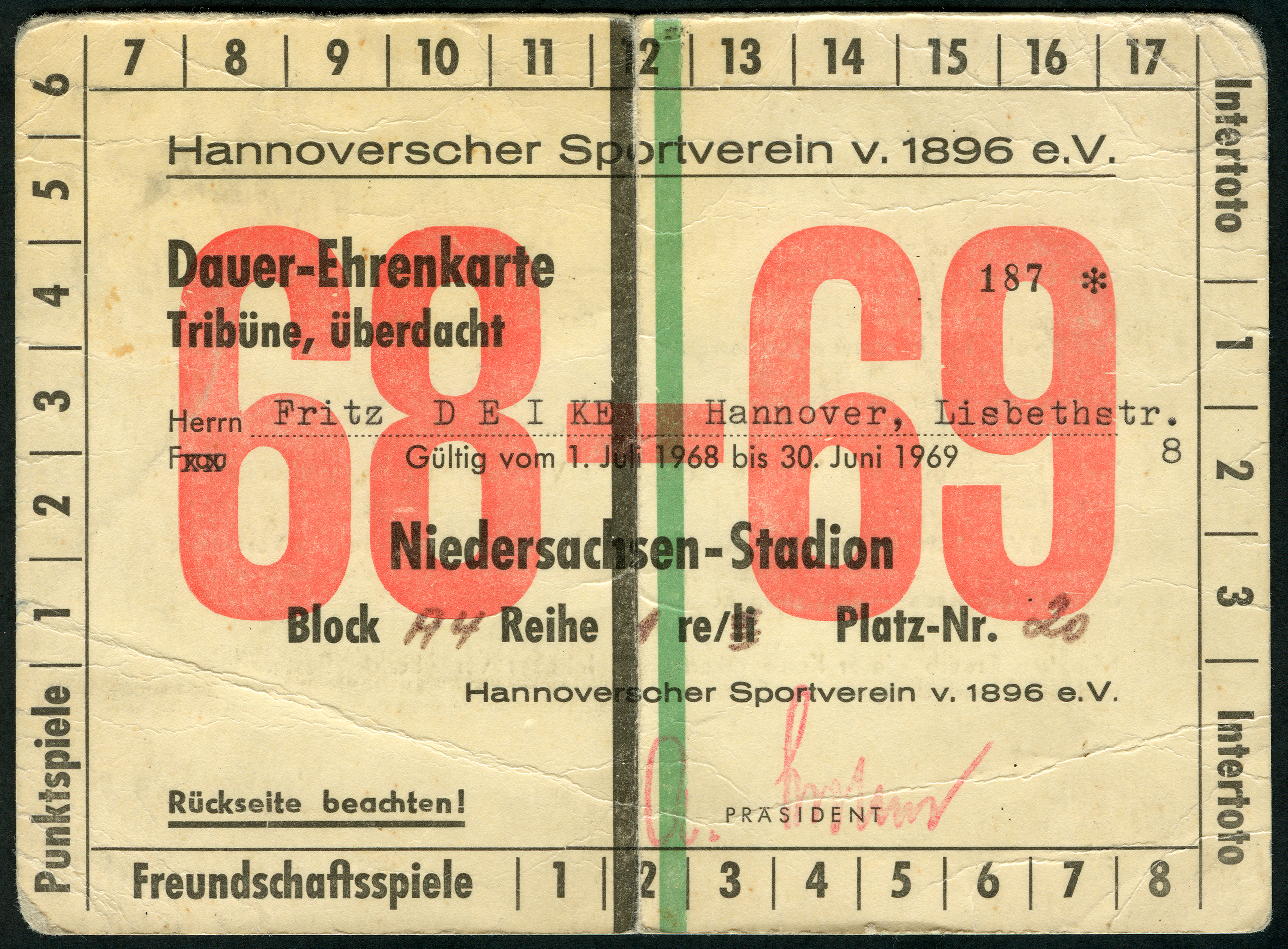 Hannoverscher Sportverein von 1896 e.V., "Dauer-Ehrenkarte, Tribüne überdacht", Nr. 187 im Niedersachsen-Stadion, Block A4, Reihe 1 rechts, Platz-Nr. 20 (und auch für das Eilenriede-Stadion, dort aber für einen unnummerierten Tribünenplatz, siehe die Rückseite) für "Herrn Fritz Deike in der Lisbethstraße 8 in Hannover. Die vom Präsidenten des HSV unterzeichnete Karte galt für Punktspiele, Freundschaftsspiele und Intertoto, nicht jedoch für (siehe Rückseite). Die Karte wurde von der "Druckerei A. Janssen, Hannover-L. gedruckt (siehe Rückseite) und im Original von Florian Berief, Inhaber des Ladens Presse Tabak Lotto in der Nelkenstraße 32 Ecke Engelbosteler Damm gemeinsam mit anderen Dokumenten freundlicherweise als Leihgabe zum Einscannen gegeben, um es als Digitalisat über Wikimedia Commons nachhaltig allen Menschen zu Bildungszwecken zur Verfügung zu stellen ...